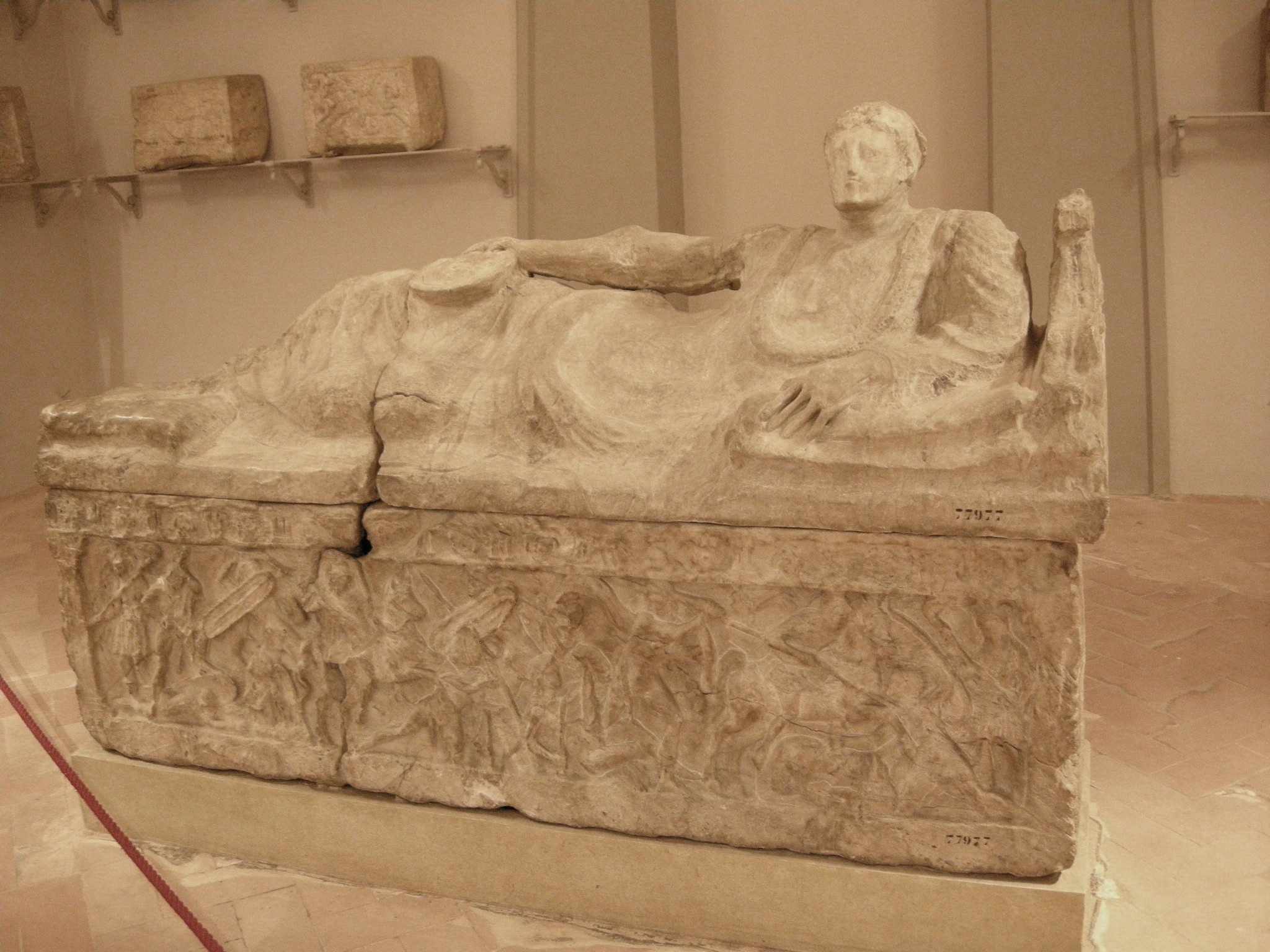 Sarcofago dell'obeso. Opera etrusca nel Museo archeologico di Firenze. Museum in Florence.